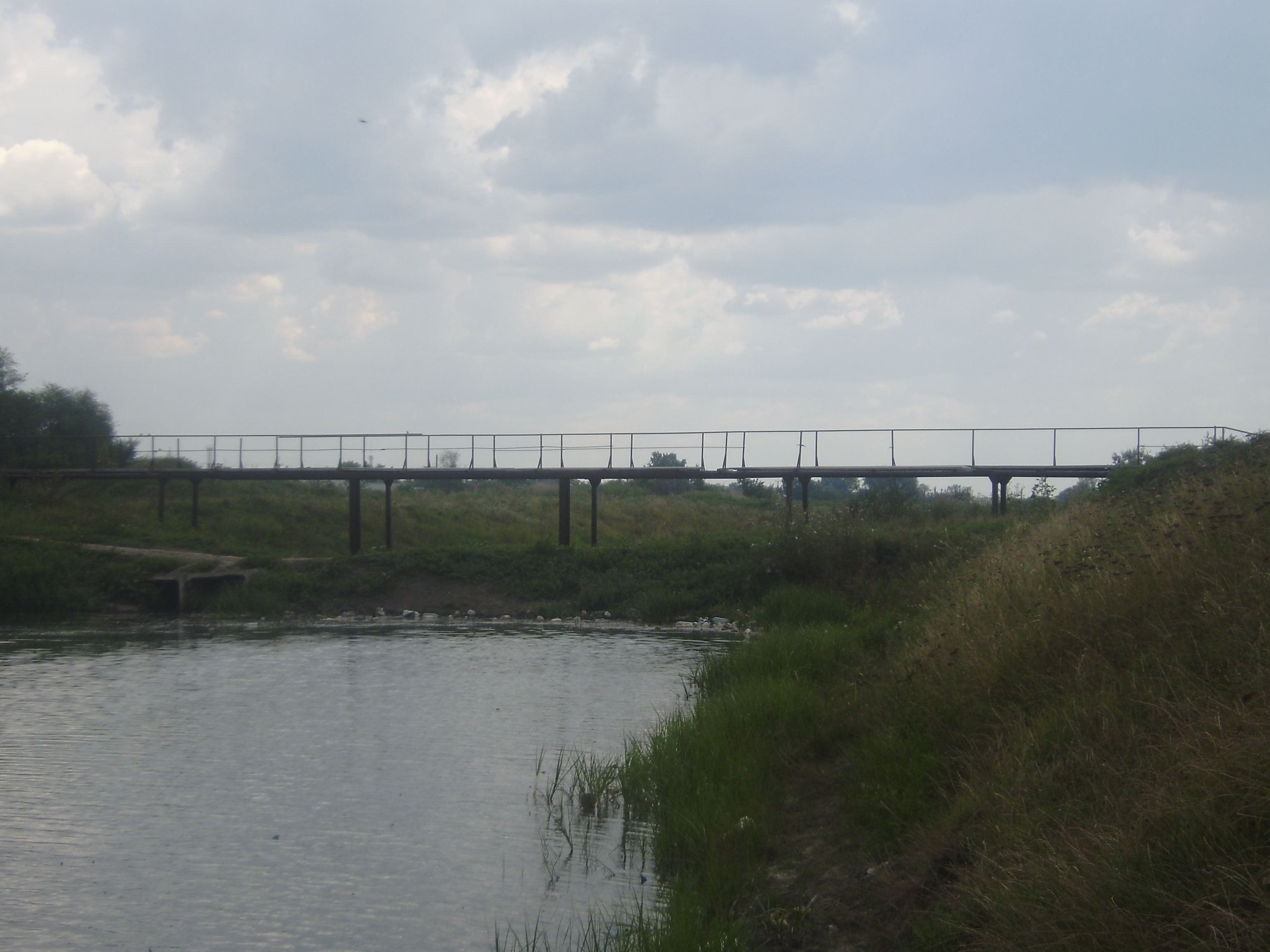 Мост